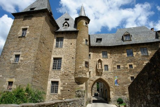 la porte Becharie